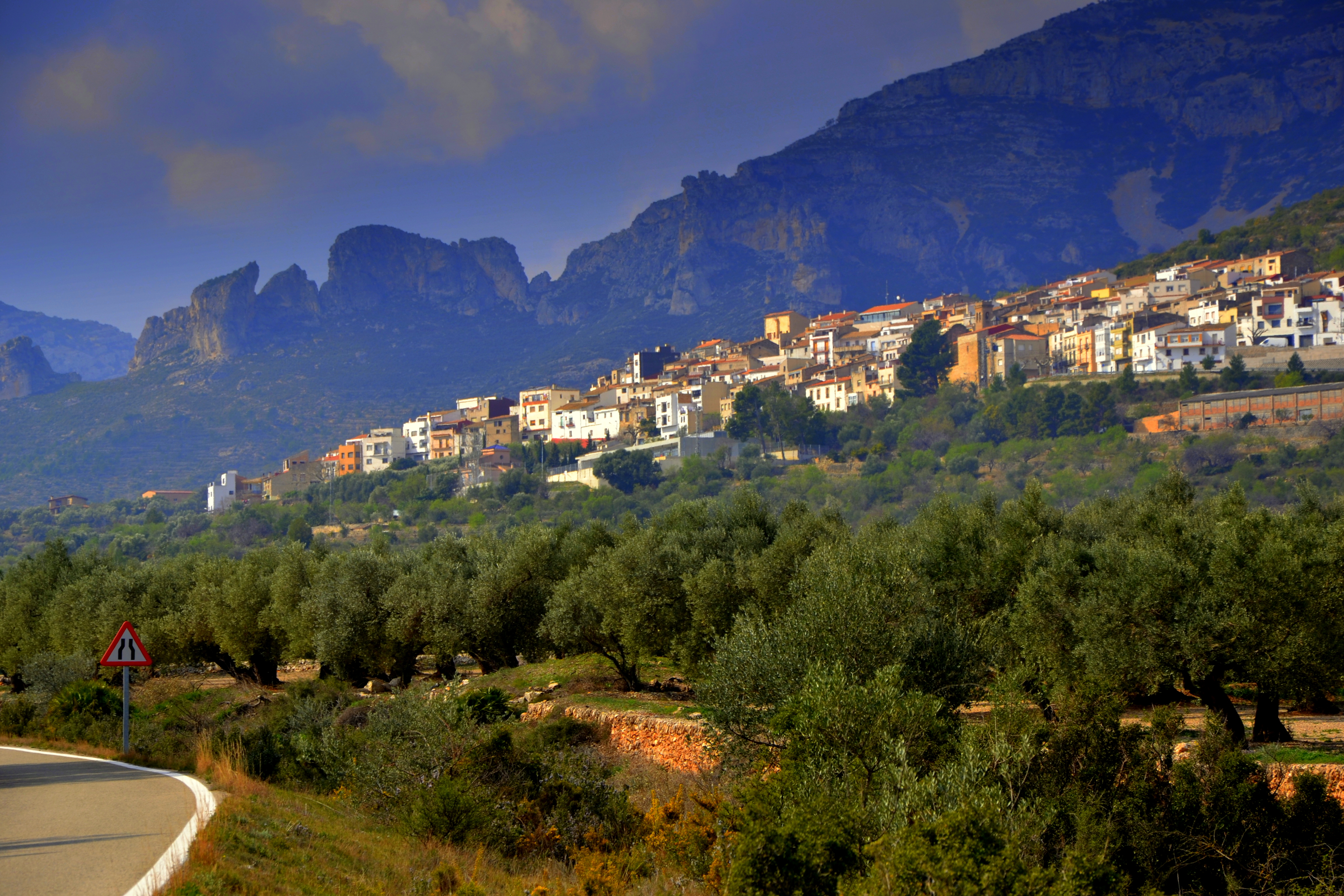 Roques i poble de Mas de Barberans This is a a photo of a natural area in Catalonia, Spain, with id: ES510154